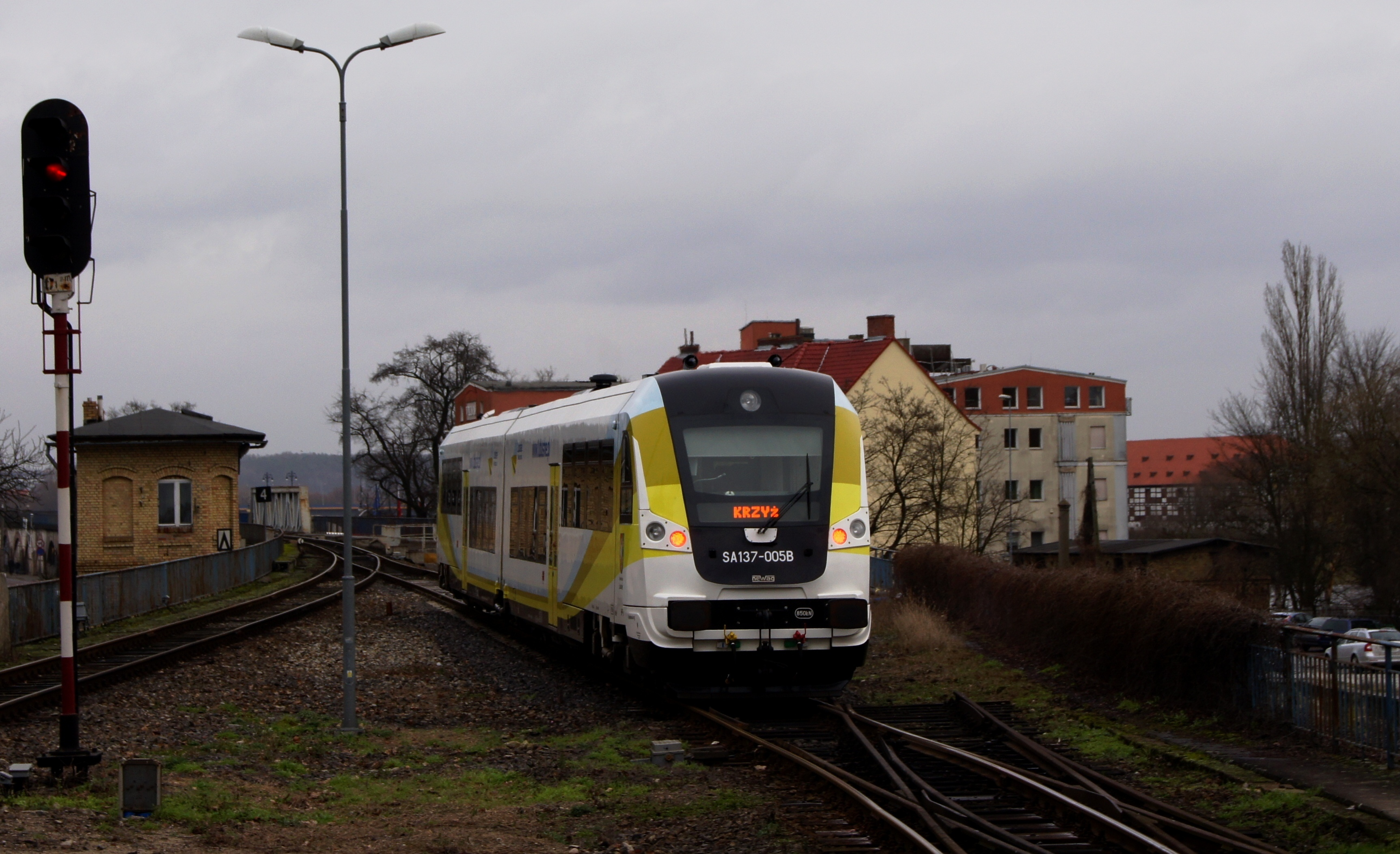 SZT Newagu w Lubuskim malowaniu opuszcza perony Gorzowskiej stacji. Pociąg REGIO Kostrzyn-Gorzów-Krzyż.